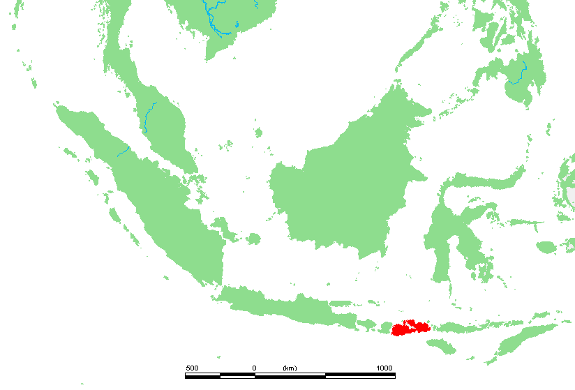 ID Tidore.PNG